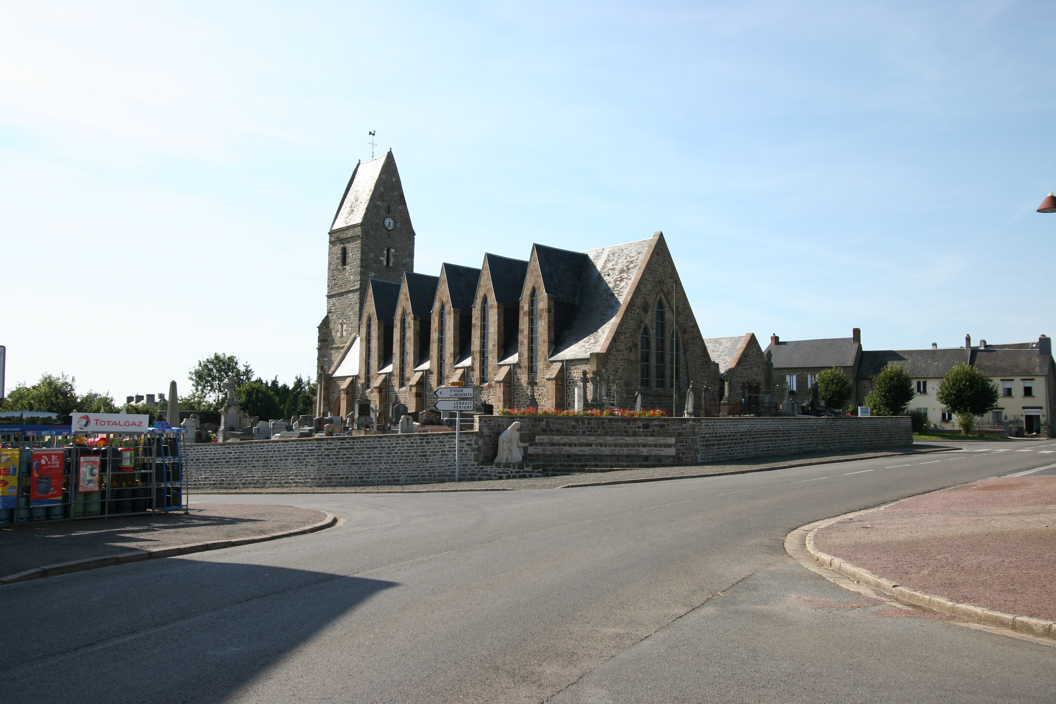 Eglise de Saint Pierre la Vieille, Calvados, France